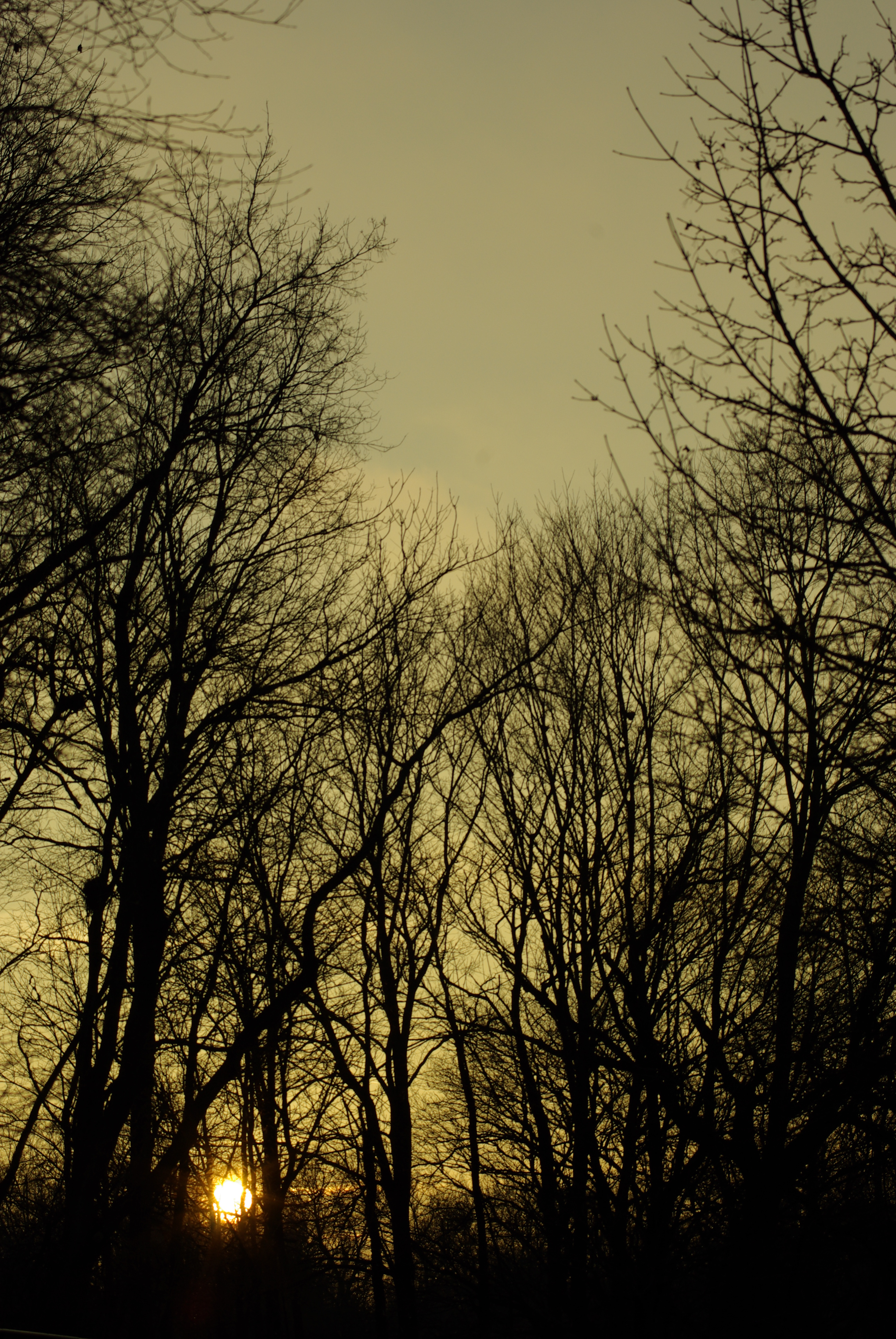 Sunset in Fenner Arboretum (Lansing, Michigan) on Christmas